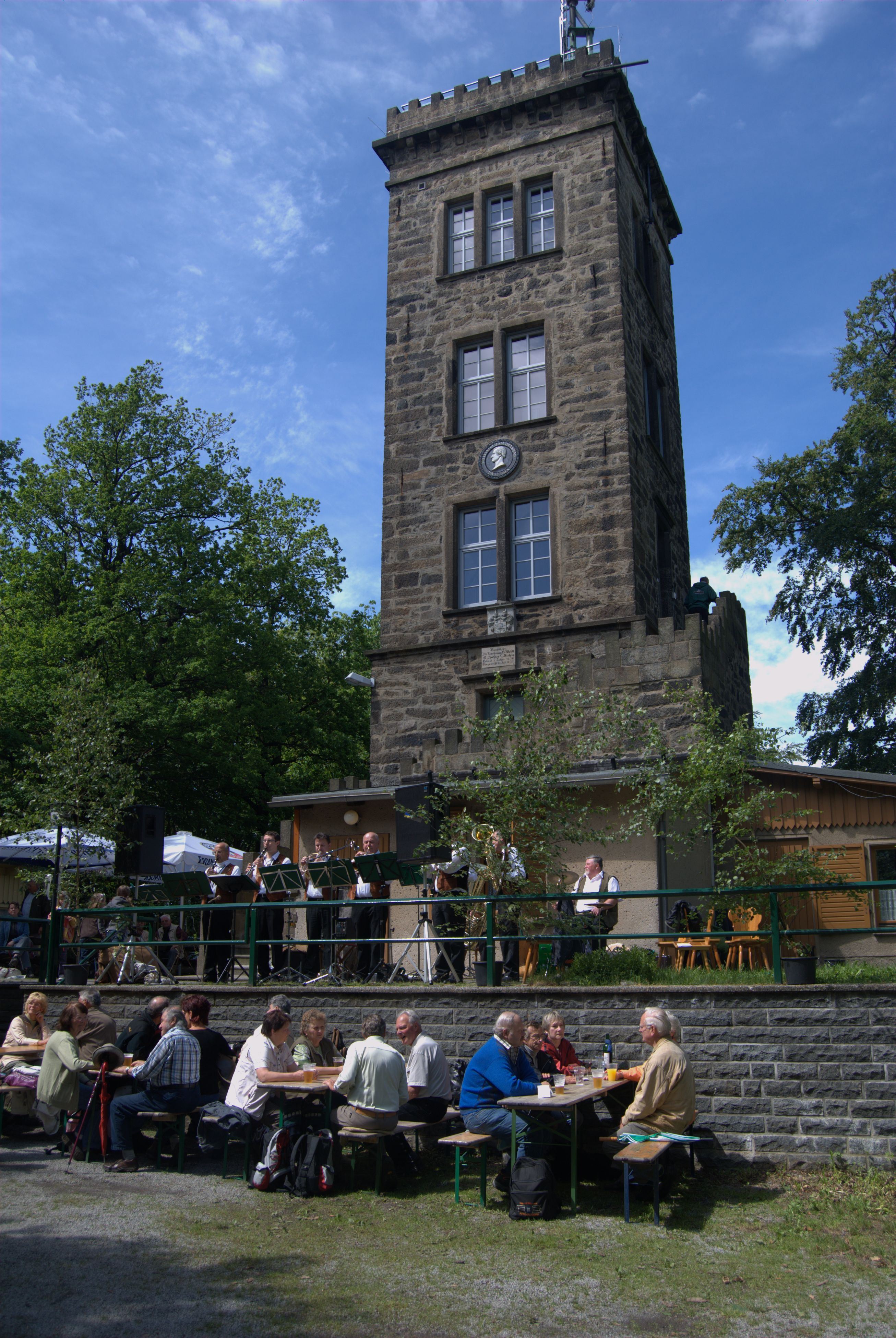 Der Turm auf dem Valtenberg